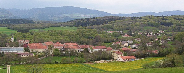 Peyriat et son hameau Giriat (Vue Générale) Automne 2005 /Rémi Dheyriat-Gauthier/